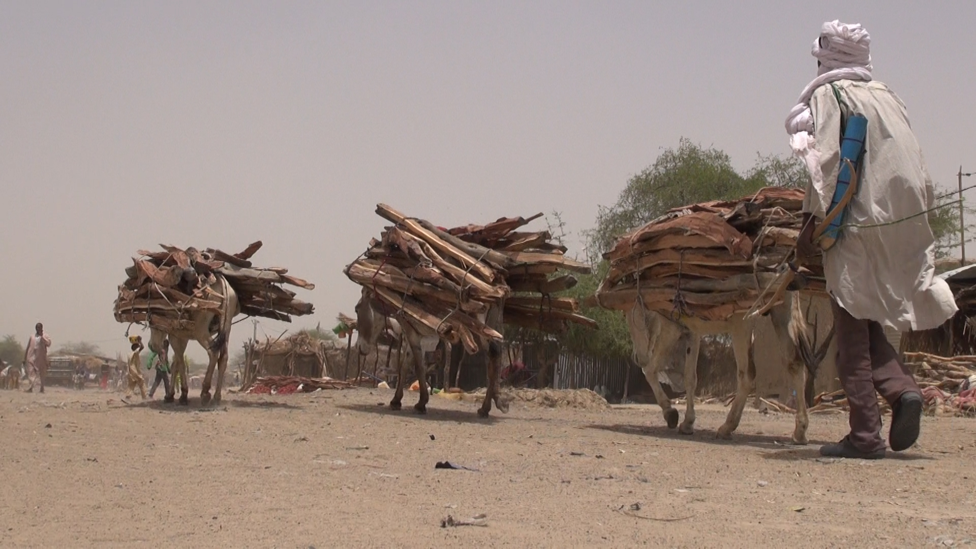 Des ânes sur le marché de Bosso dans la région de Diffa, Niger, le 19 avril 2017 (VOA/Nicolas Pinault)